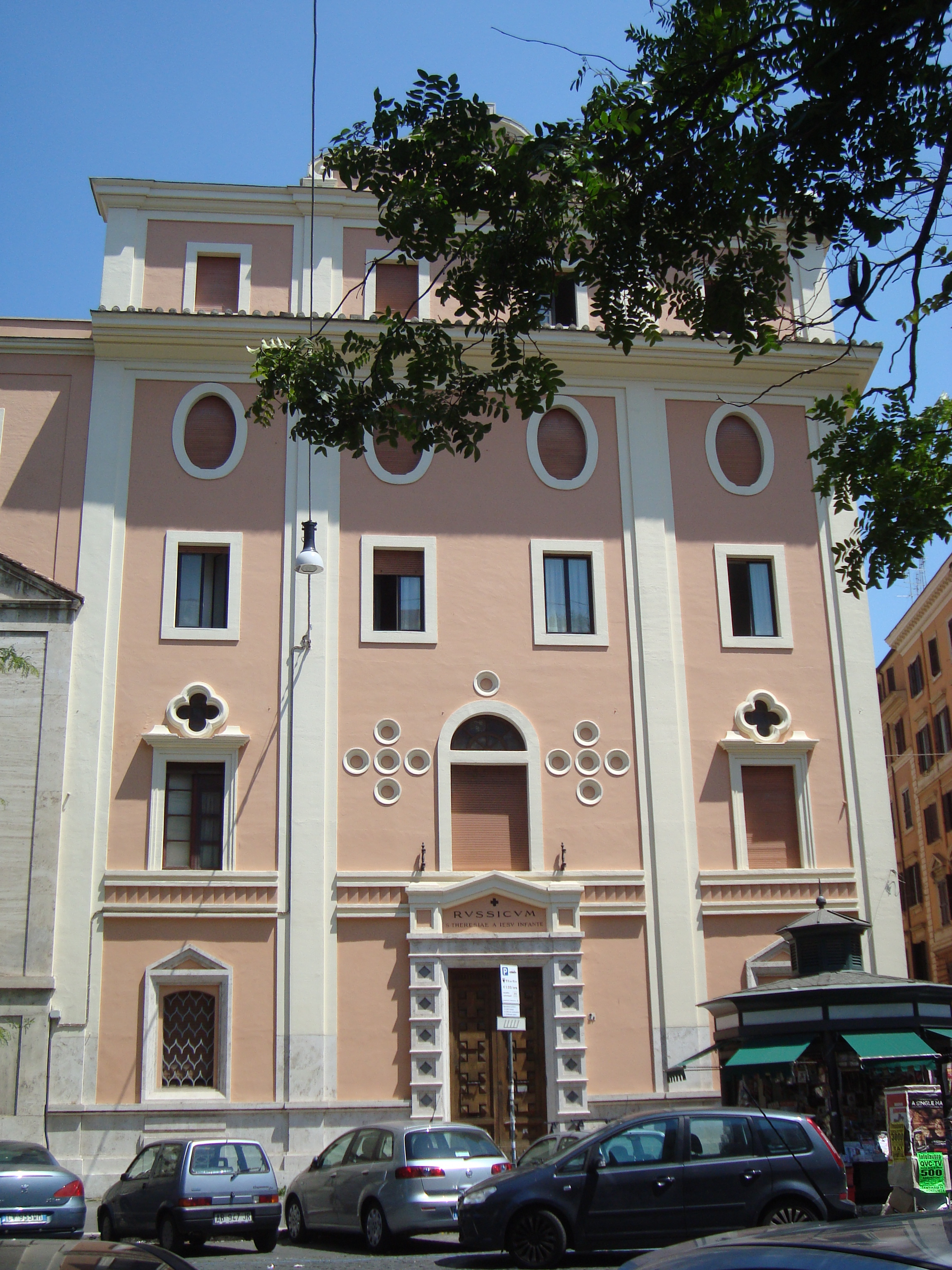 Façade du Collège Russicum à Rome, via Carlo Alberto.